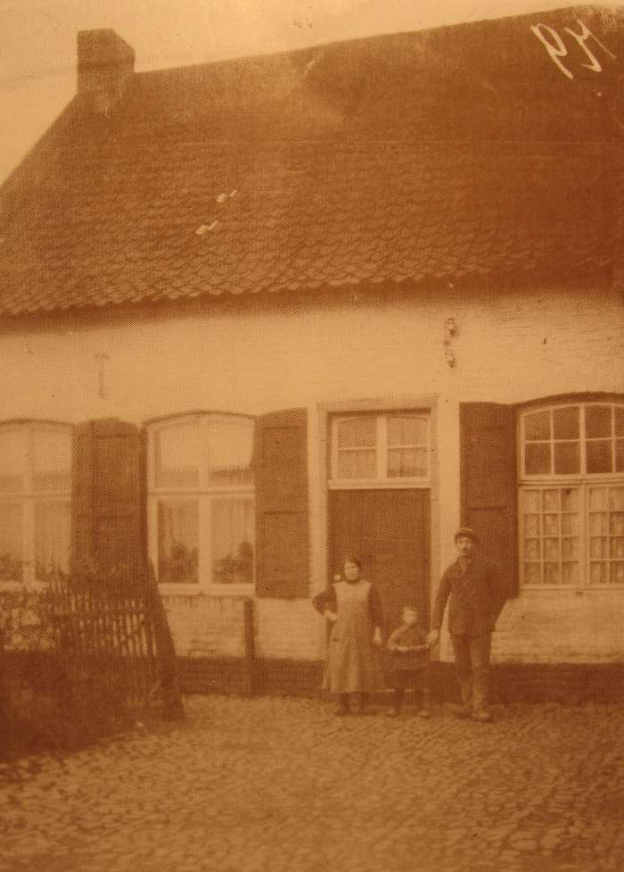 Pastorie van de oude kerk in Oud-Roosteren met Theodorus Rutten, zijn vrouw Phillipina and zoon Jan.